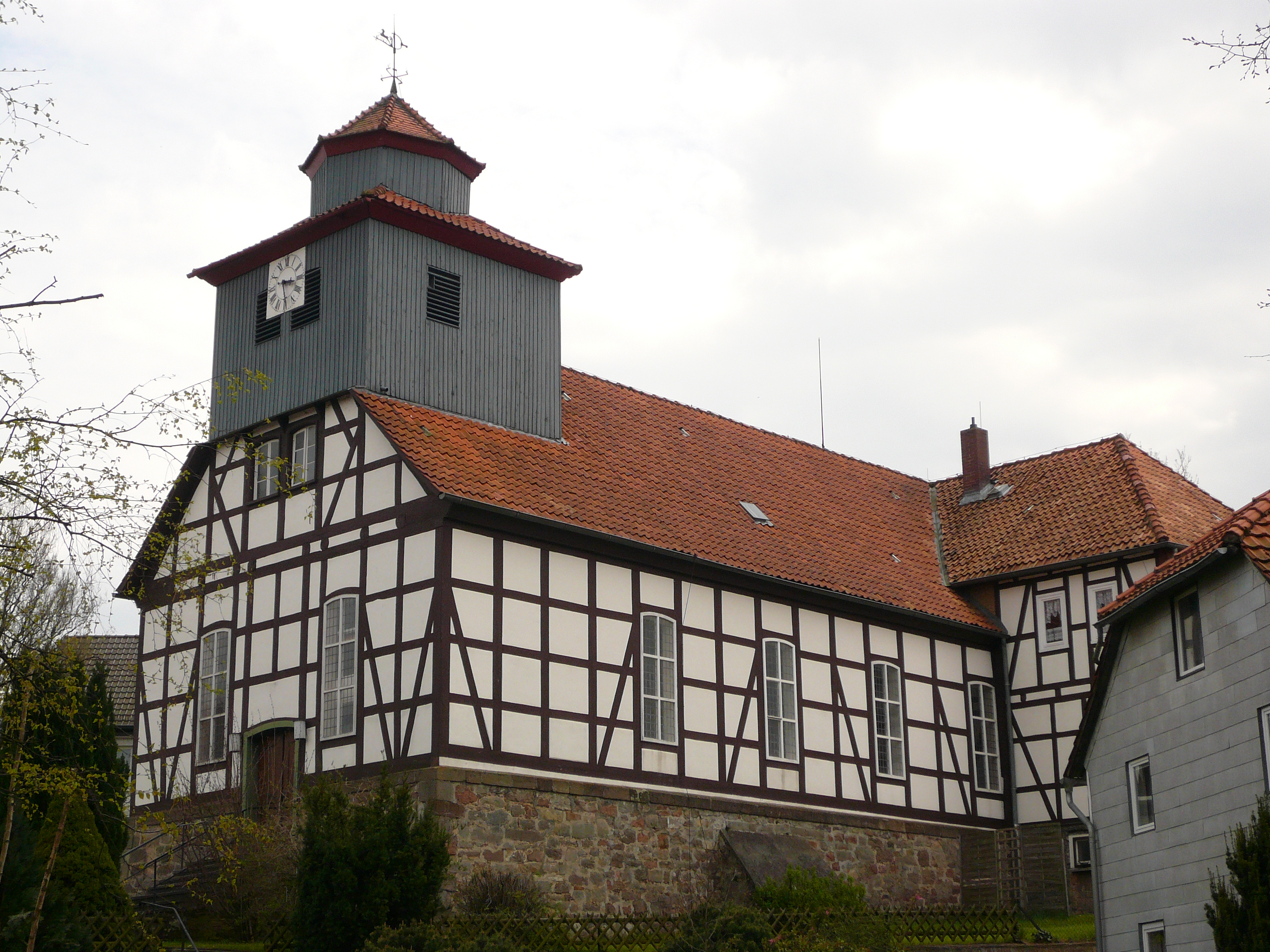 Fachwerkkirche im Ortsteil Hettensen der Stadt Hardegsen, erbaut 1793